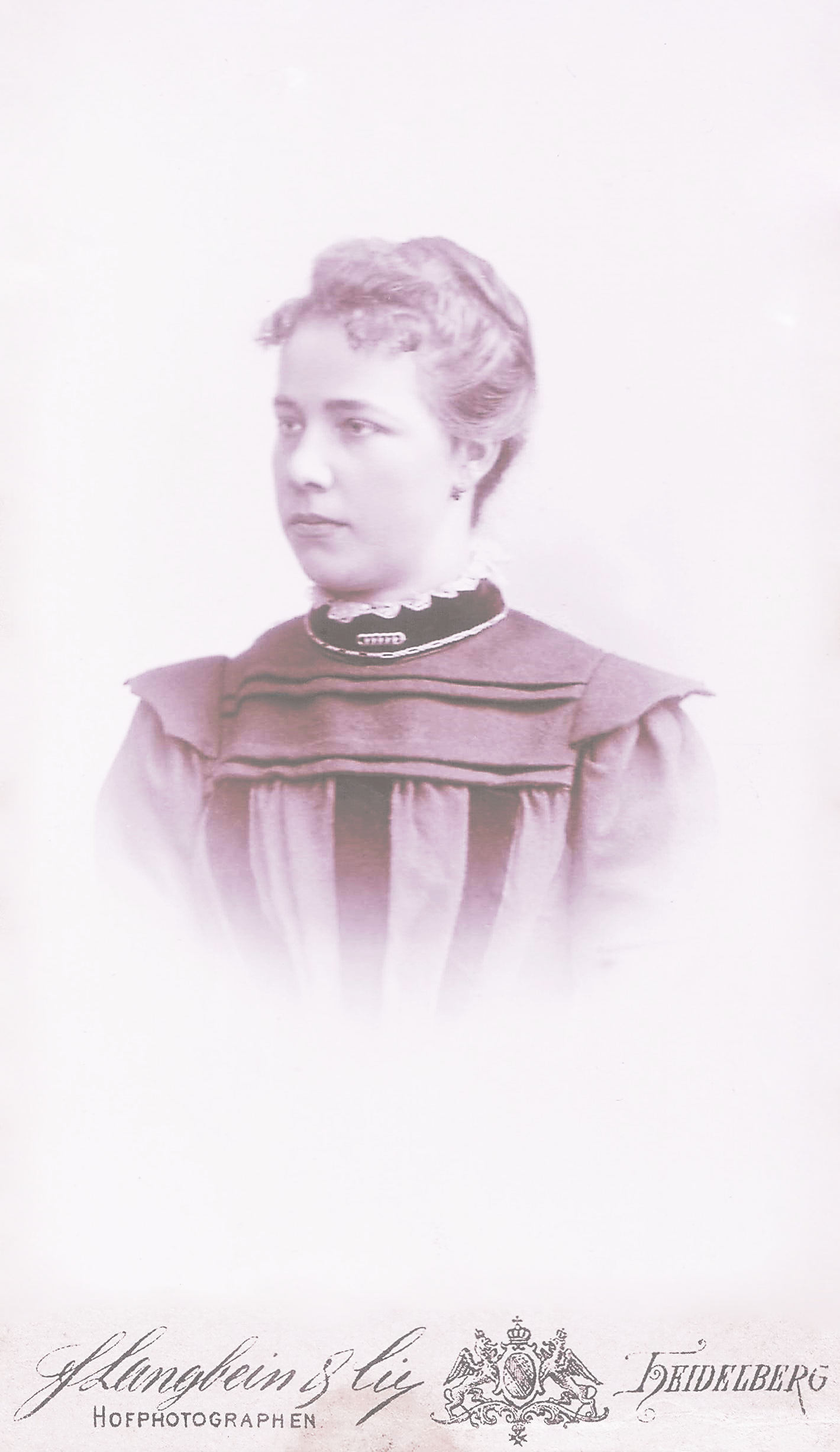 Sibylla Luise Boßler, geb. Götz. Tochter des Johann Friedrich II. Götz, Stammmutter der jüngeren Linie der Fam. Boßler